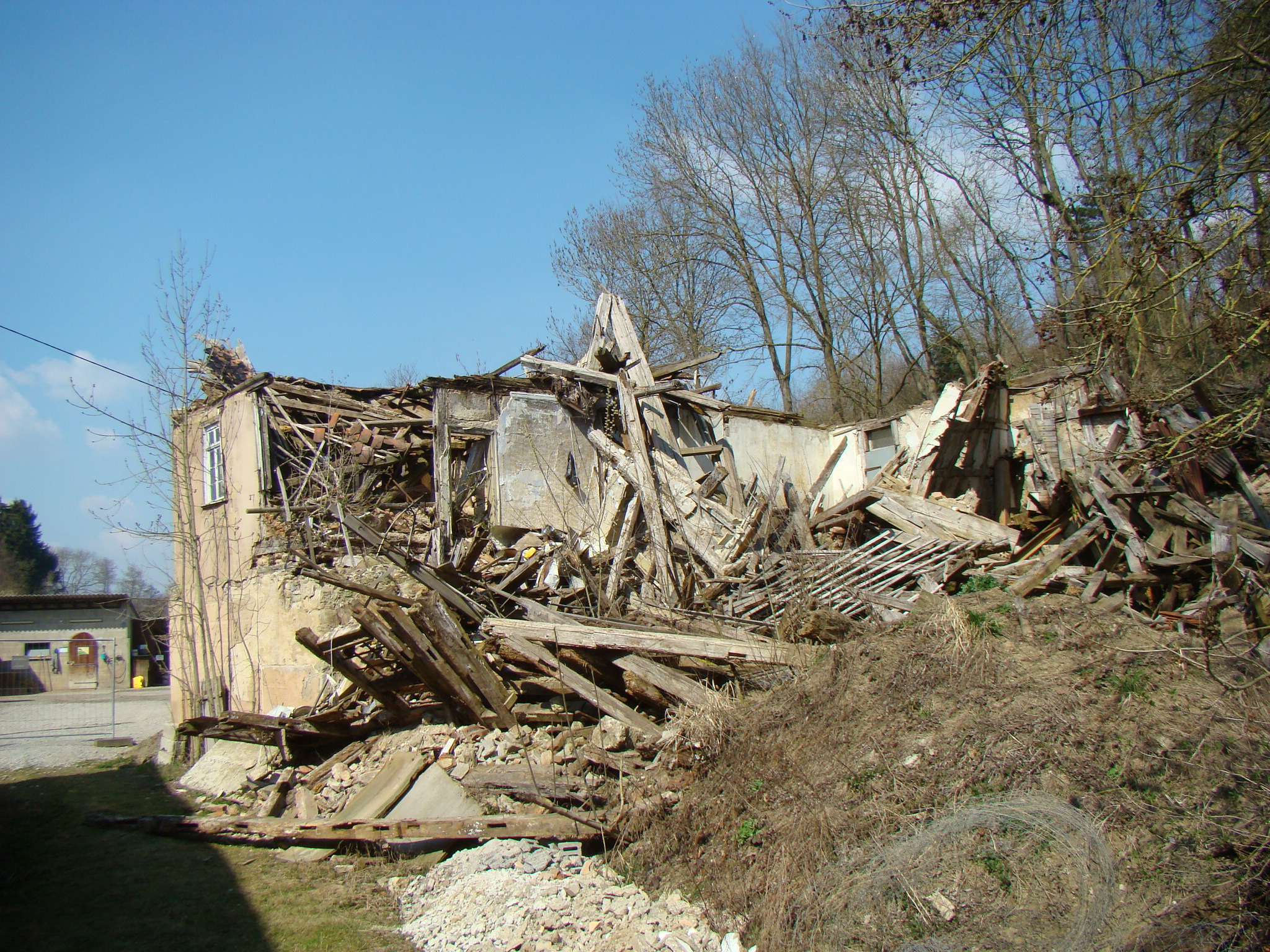 Alte Mühle in HN-Biberach. Foto: März 2012